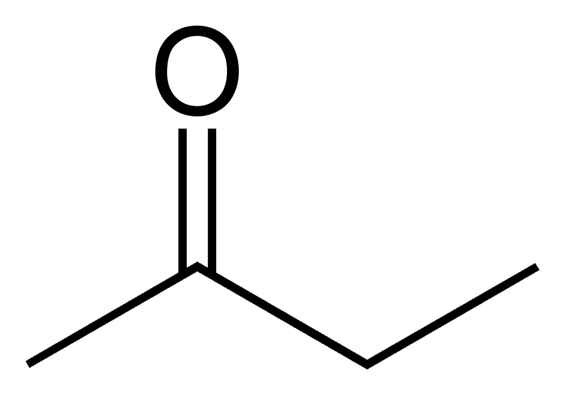 Butanone